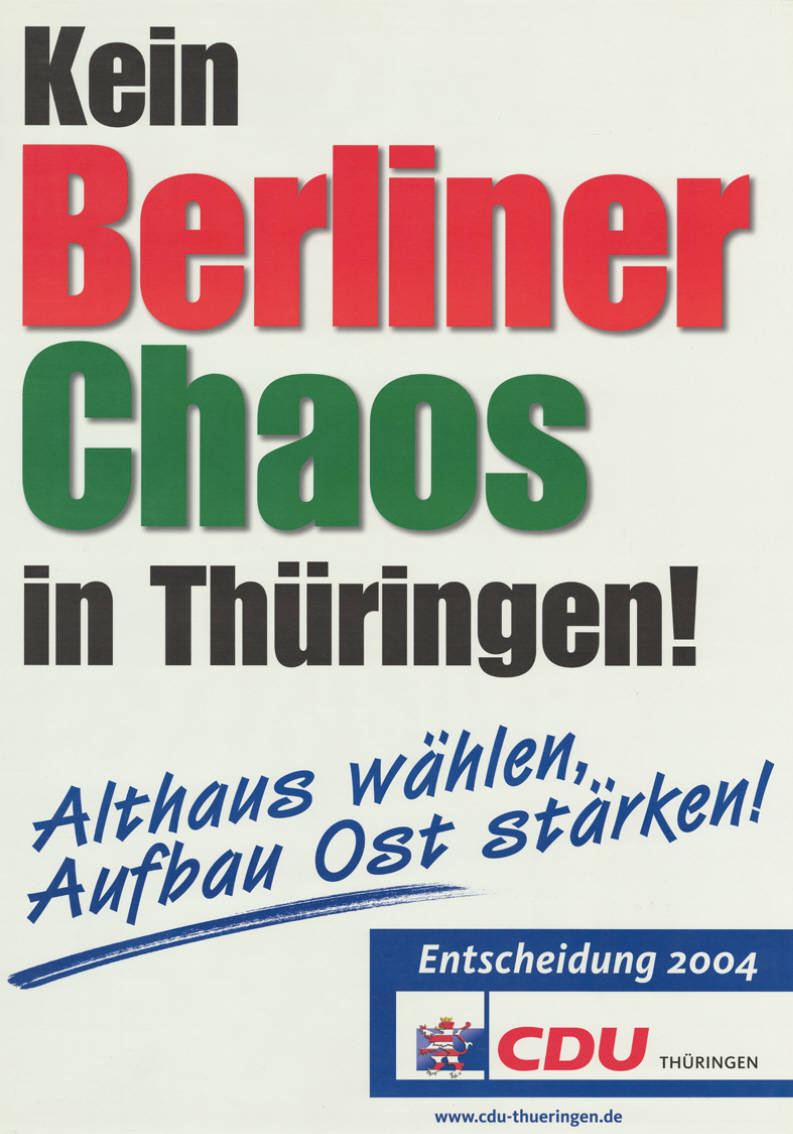 Kein Berliner Chaos in Thüringen! Althaus wählen, Aufbau Ost stärken! Entscheidung 2004 CDU Thüringen Plakatart: Textplakat Allgemein Auftraggeber: CDU LV Thüringen Objekt-Signatur: 10-037 : 605 Bestand: Landtagswahlplakate Thüringen (10-037) GliederungBestand10-18: Landtagswahlplakate Thüringen (10-037) » CDU Lizenz: KAS/ACDP 10-037 : 605 CC-BY-SA 3.0 DE